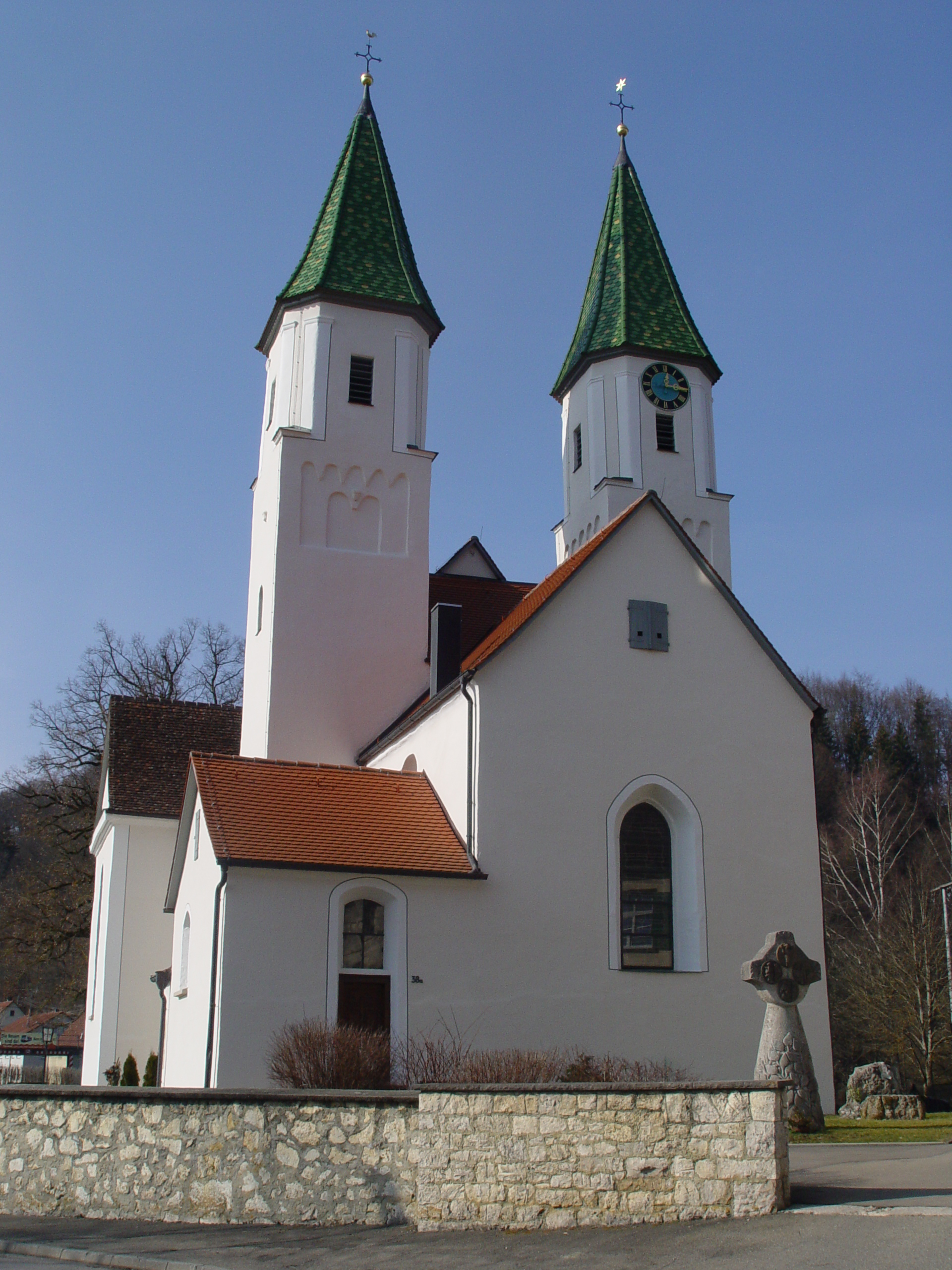 St. Michaelskirche in Veringendorf